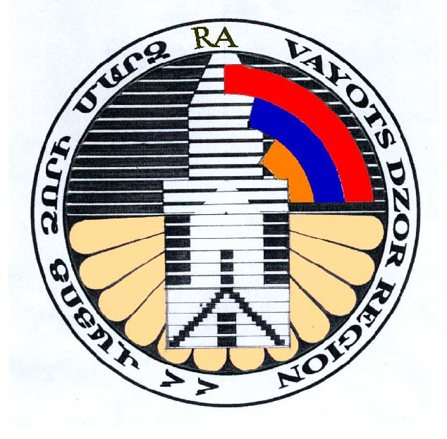 герб марза Вайоц Дзор